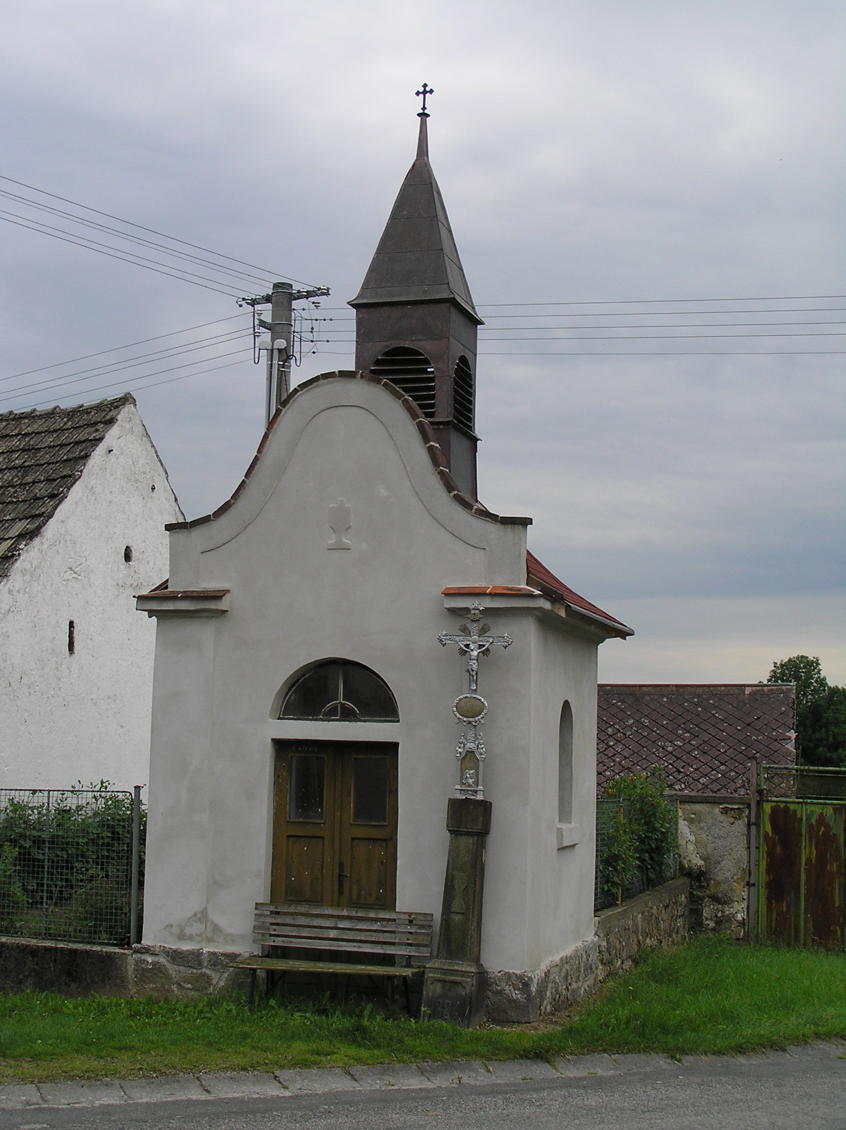 Škrobočov, kaplička na návsi